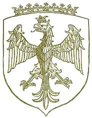 Stemma di Palermo nel frontespizio dell'opera Siculi or Praedicatorum di E. T. Fazello (1560)